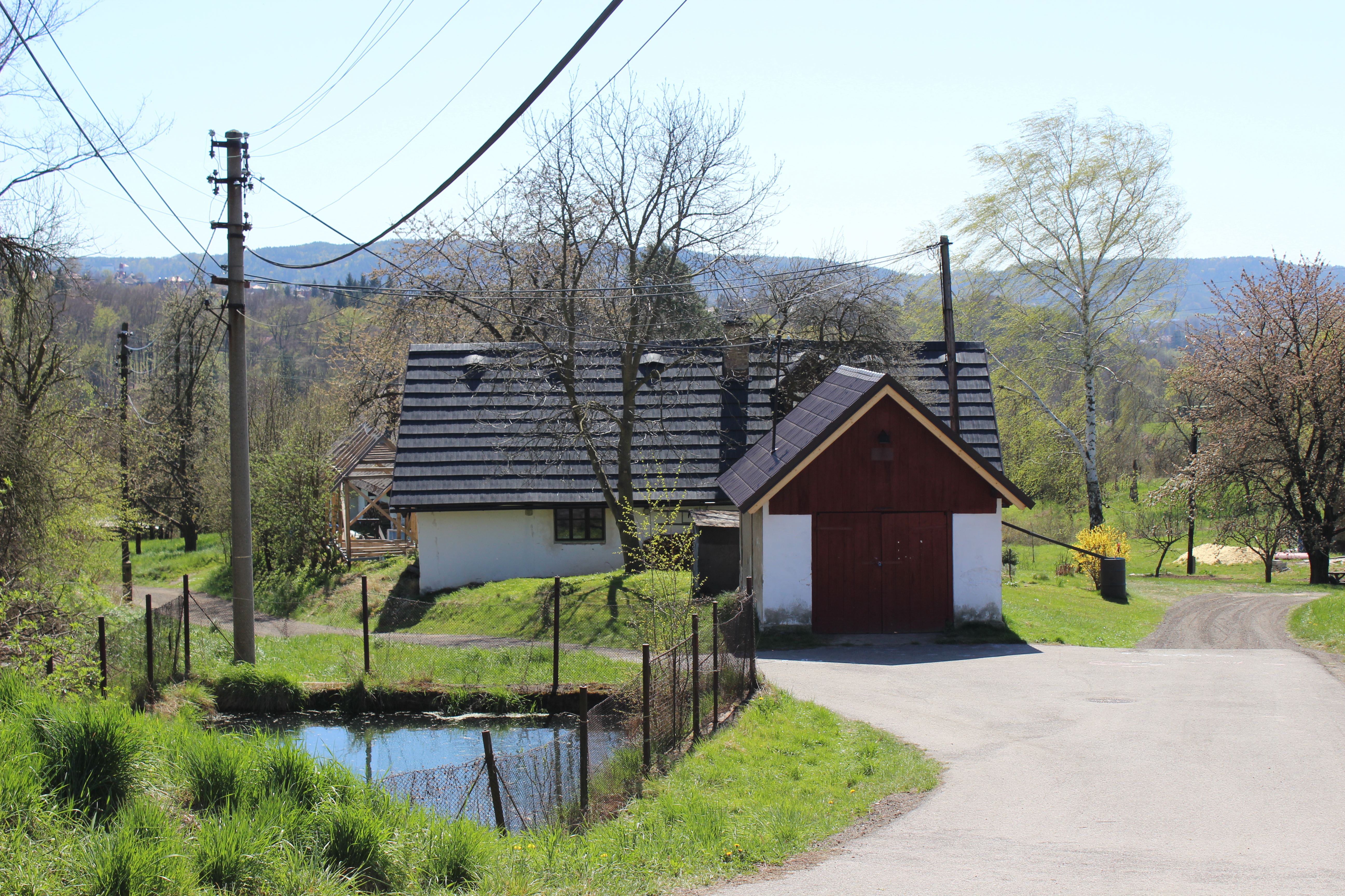 Dům číslo popisné 30 v Kobylce, části Turnova.